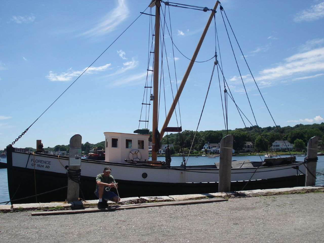 Le Florence au Mystic Seaport ( Connecticut)